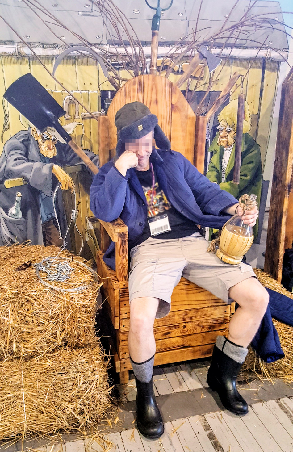 Jakub Wędrowycz, postać z książek Andrzeja Pilipiuka, Pyrkon, Poznań